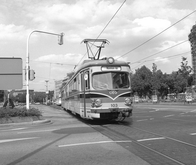 OEG tram at Friedrichsring, Mannheim